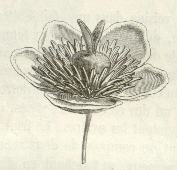 Illustration of Barbeuia madagascariensis from H. Baillon's Histoire des plantes vol. 4